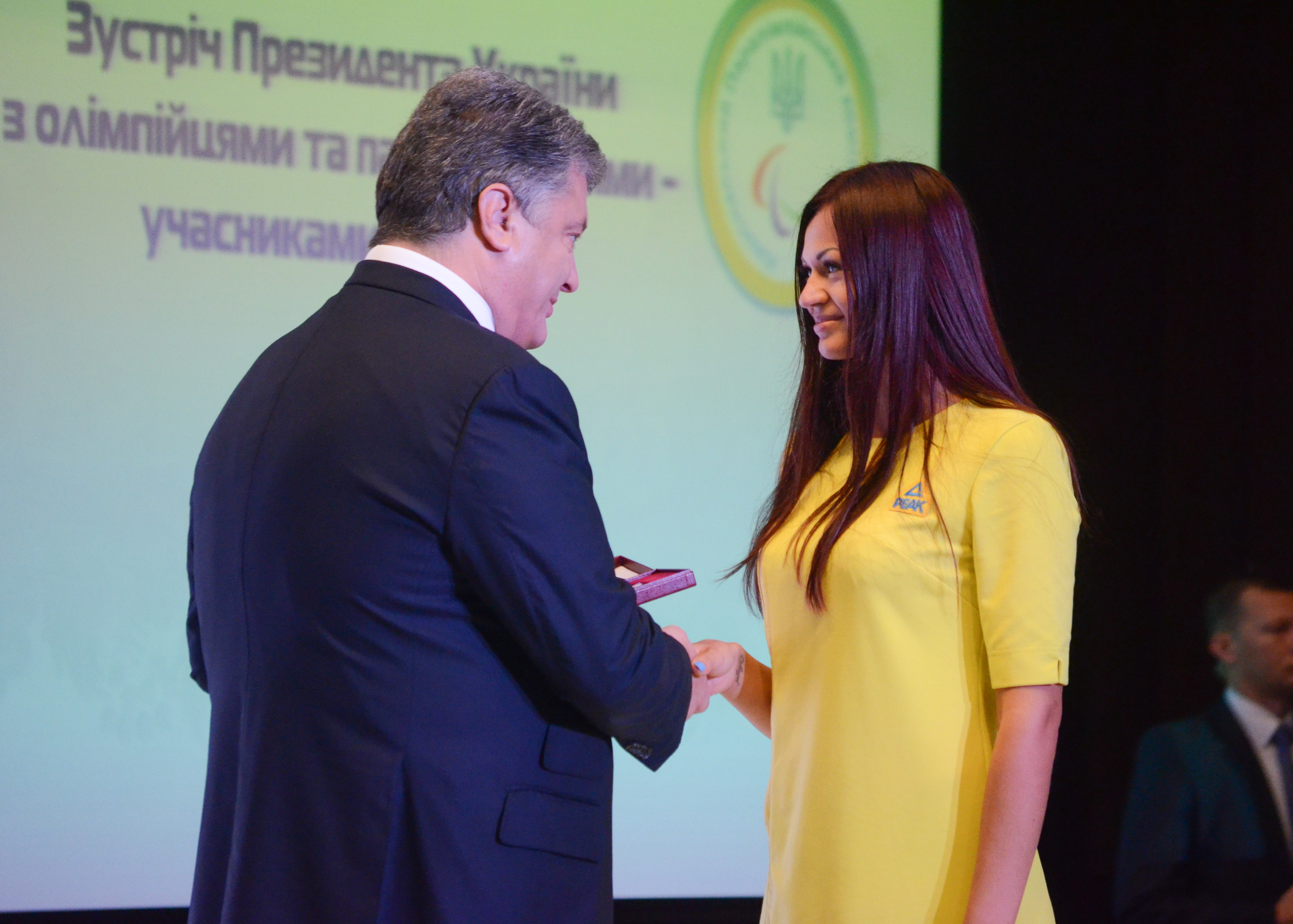 Зустріч Президента України з олімпійцями та паралімпійцями — учасниками Ріо-2016.